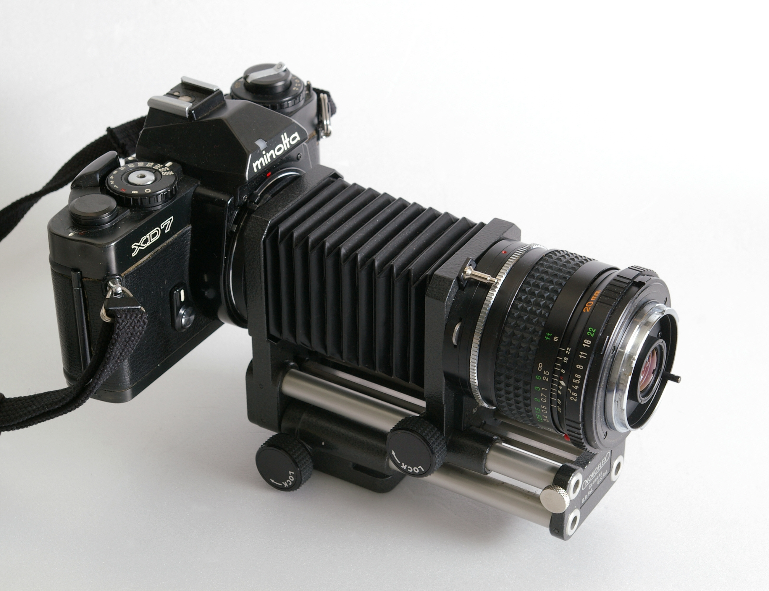 Novoflex BALMIN-AS montiert an einer Minolta XD-7. Objektiv Minolta MD 2,8/20mm mit Umkehrring in Retrostellung. In dieser Kombination kann eine maximale Vergrößerung von etwa 9:1 erreicht werden. Durch die Retrostellung können eingestellter Blendenwert oder die Betätigung der automatischen Springblende nicht zwischen Kamera und Objektiv übertragen werden. ExposureTime - 1/180 seconds FNumber - 13.00 ExposureProgram - Manual control ISOSpeedRatings - 200 FocalLength - 50 mm FocalLengthIn35mmFilm - 75 mm